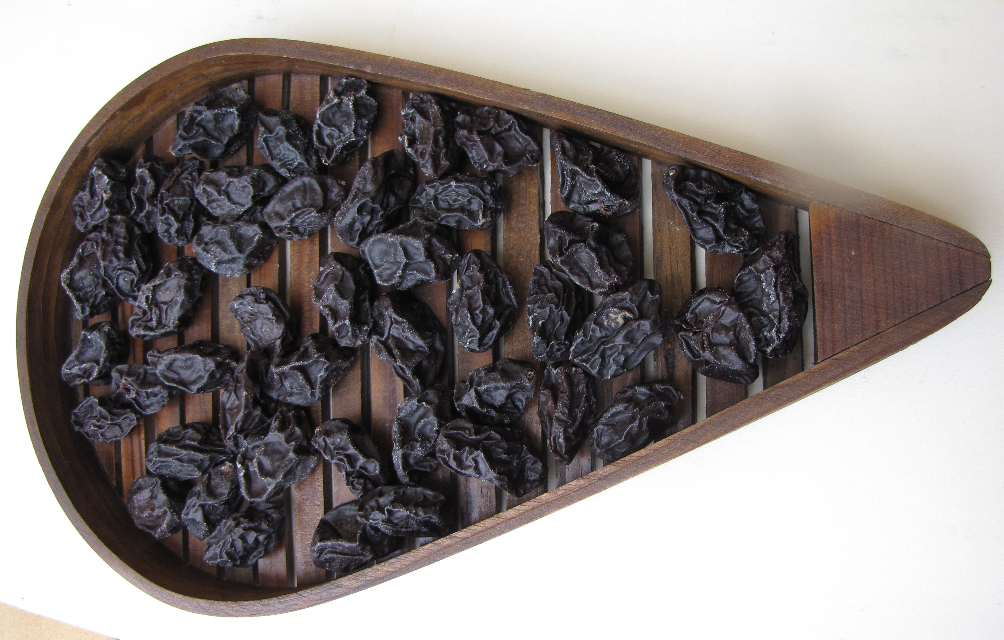 Séchage des pruneaux